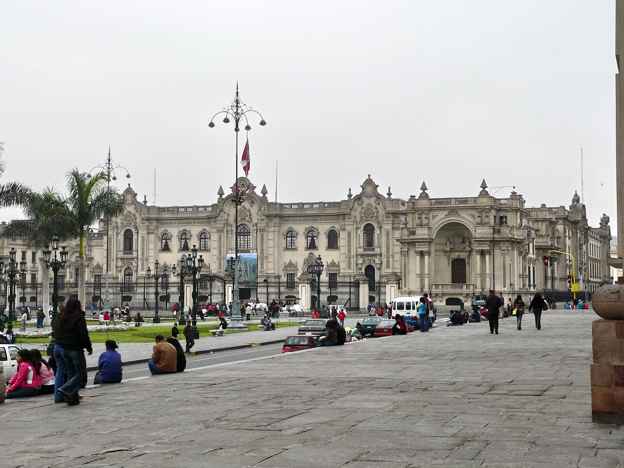 Palacio de Gobierno del Perú